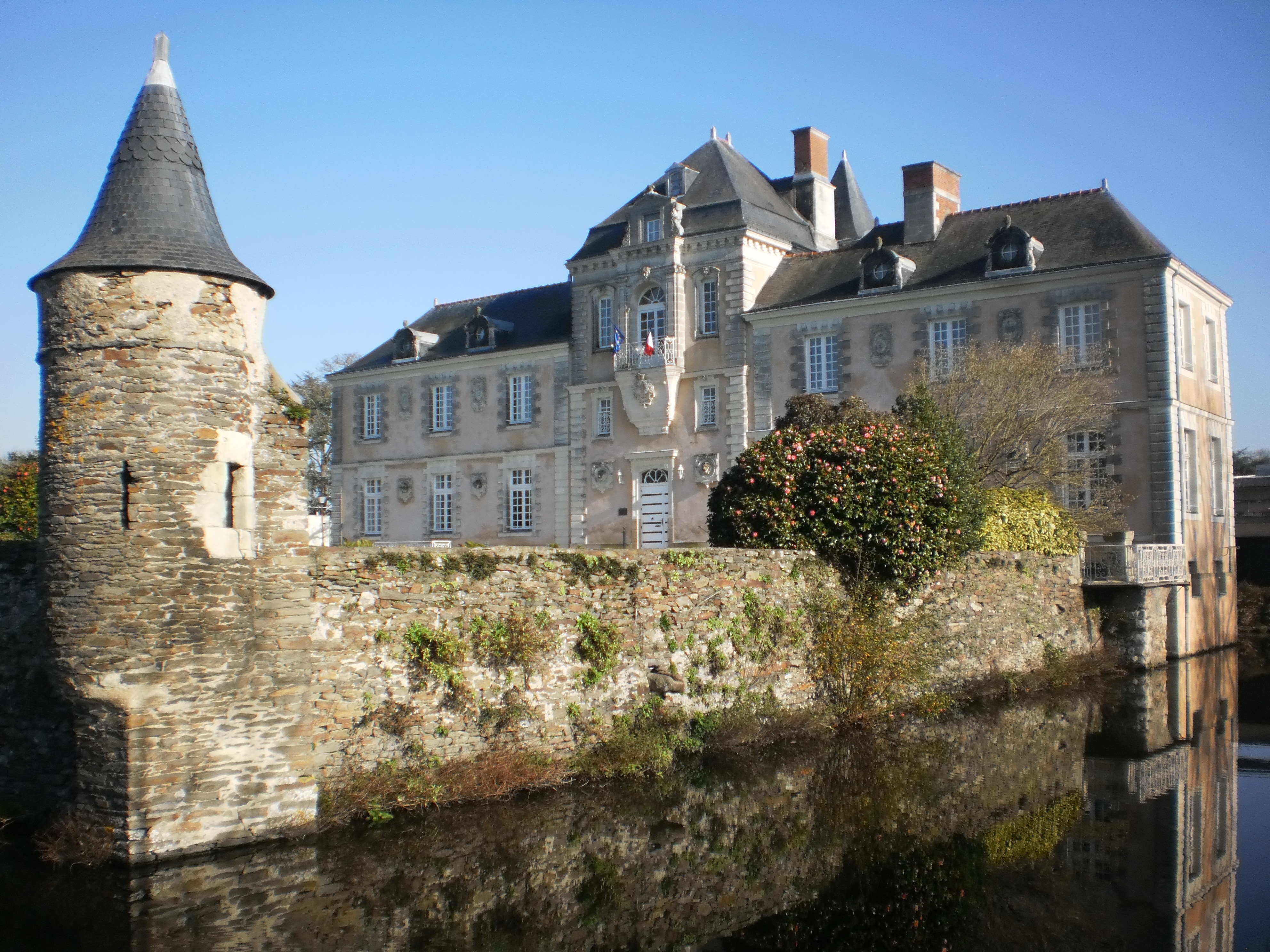 Château de Chassay - Sainte-Luce-sur-Loire (Loire-Atlantique, France). Ce bâtiment du XVIe siècle a servi de résidence aux évêques de Nantes jusqu'à la Révolution française. Il fait aujourd'hui office d'hôtel de ville.